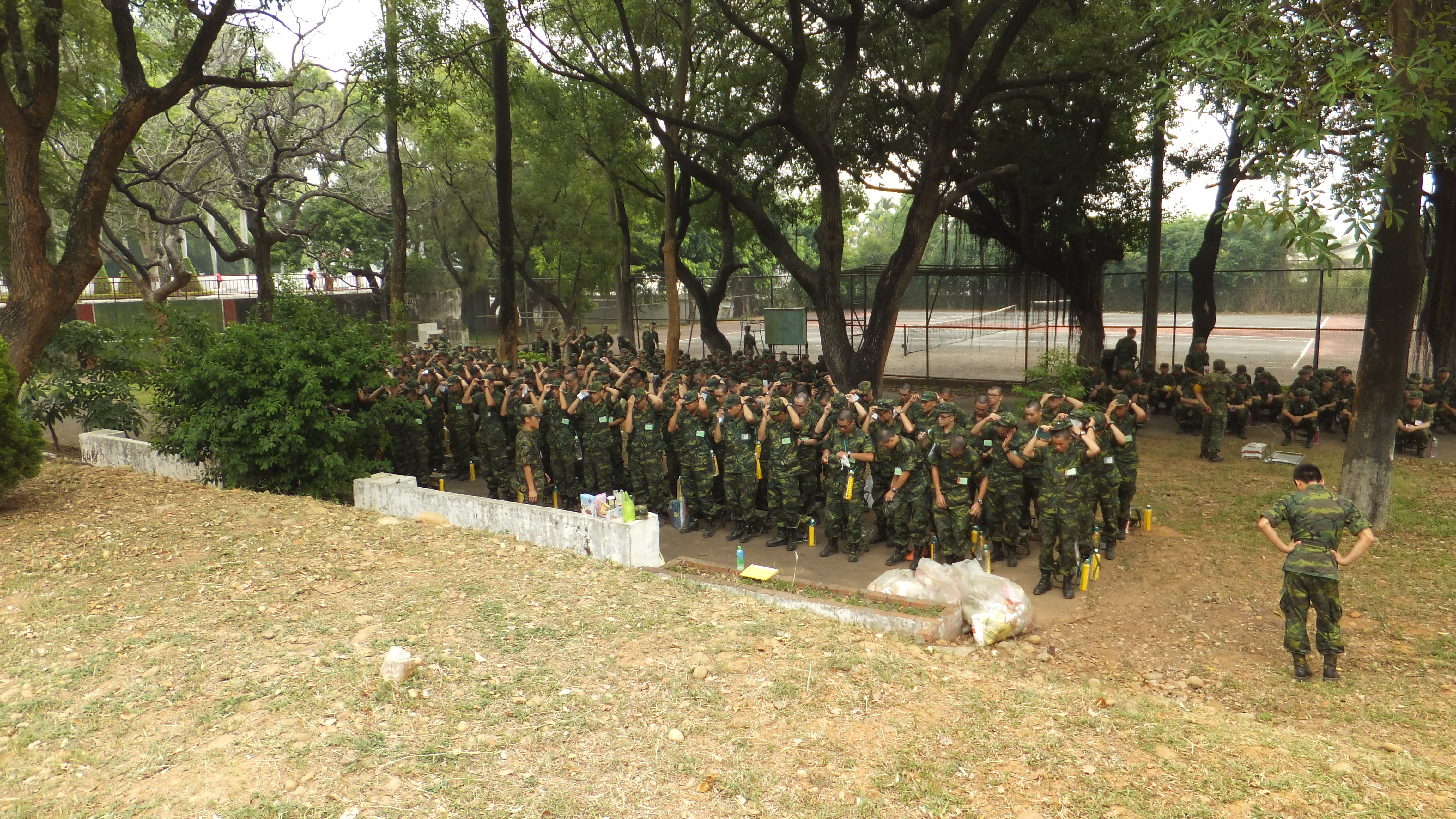 成功嶺營區懇親日，休息地點受命起立覆帽，準備移動的新兵。